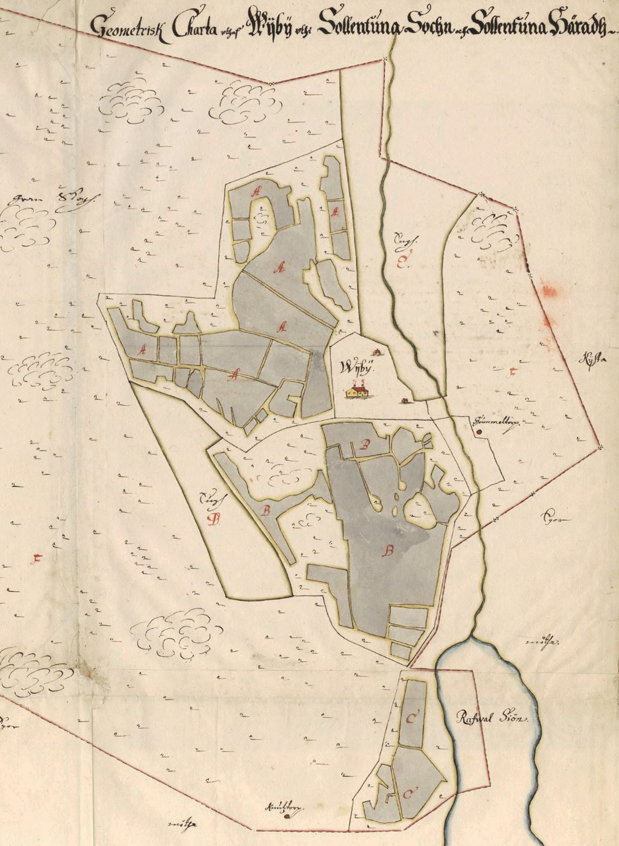 Geometrisk karta över Viby i Sollentuna socken